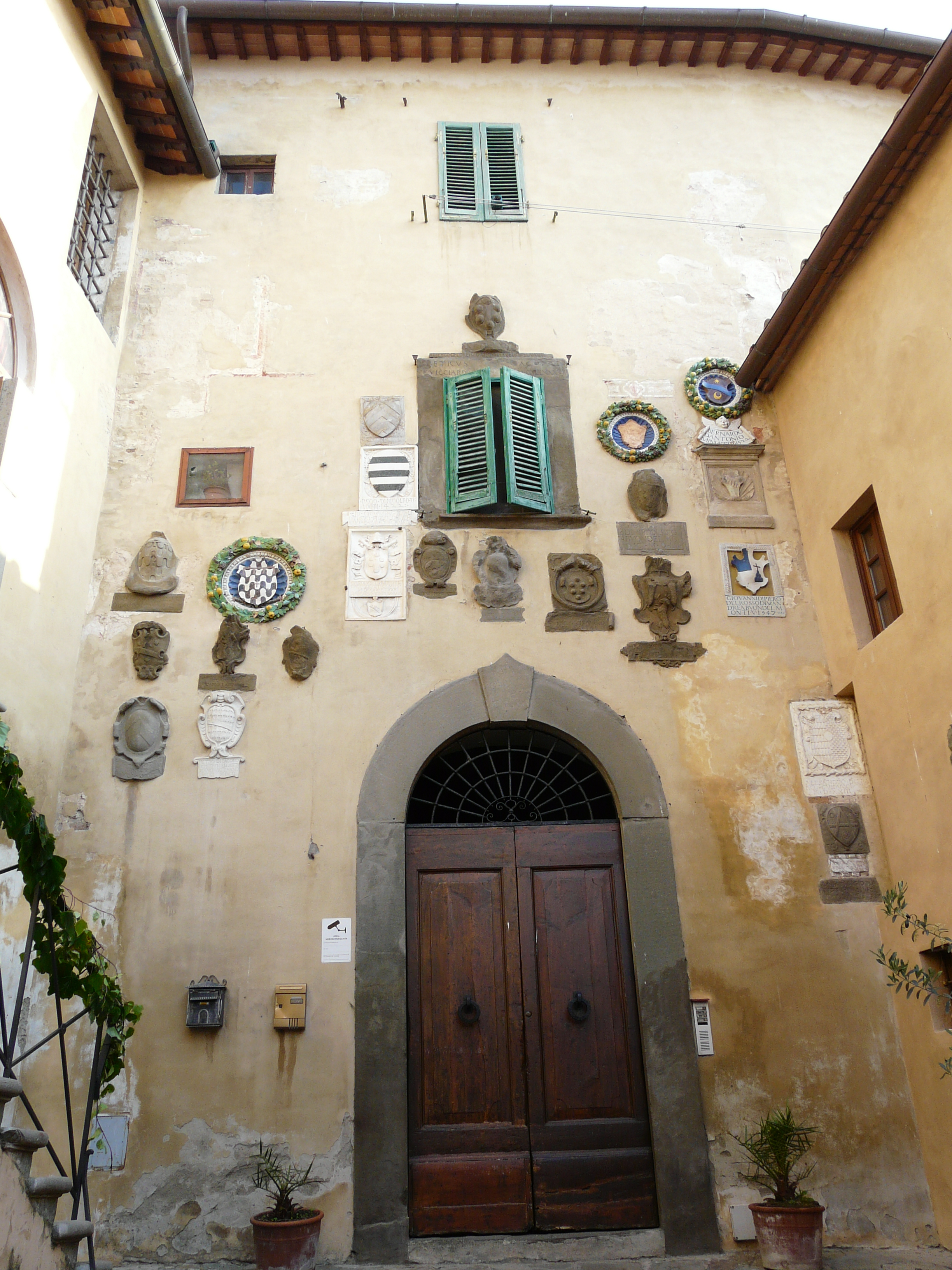 Palazzo Pretorio, Comune di Vicopisano, Toscana, Italia